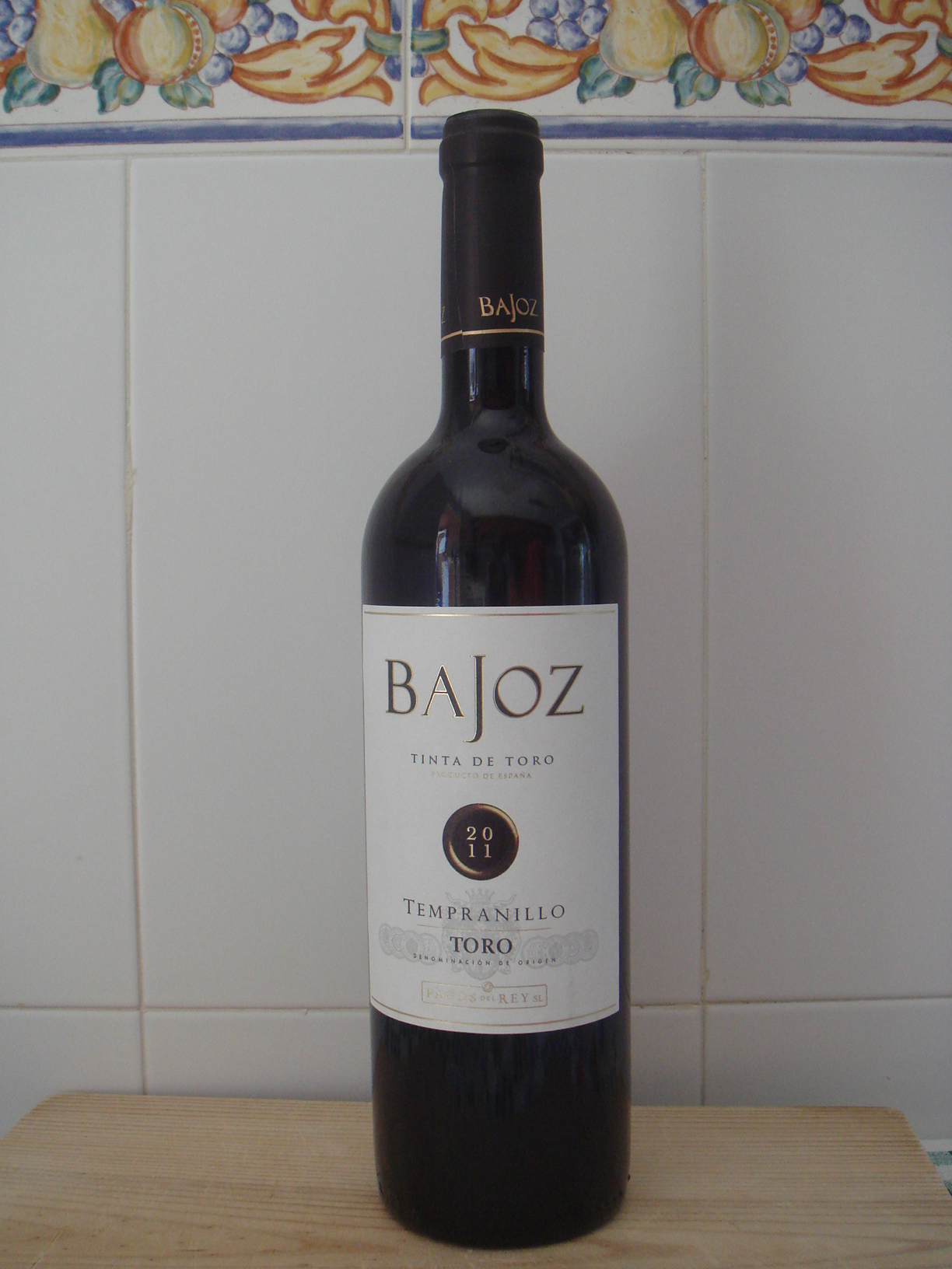 Botella de vino de la denominación de origen Toro, provincia de Zamora, España.